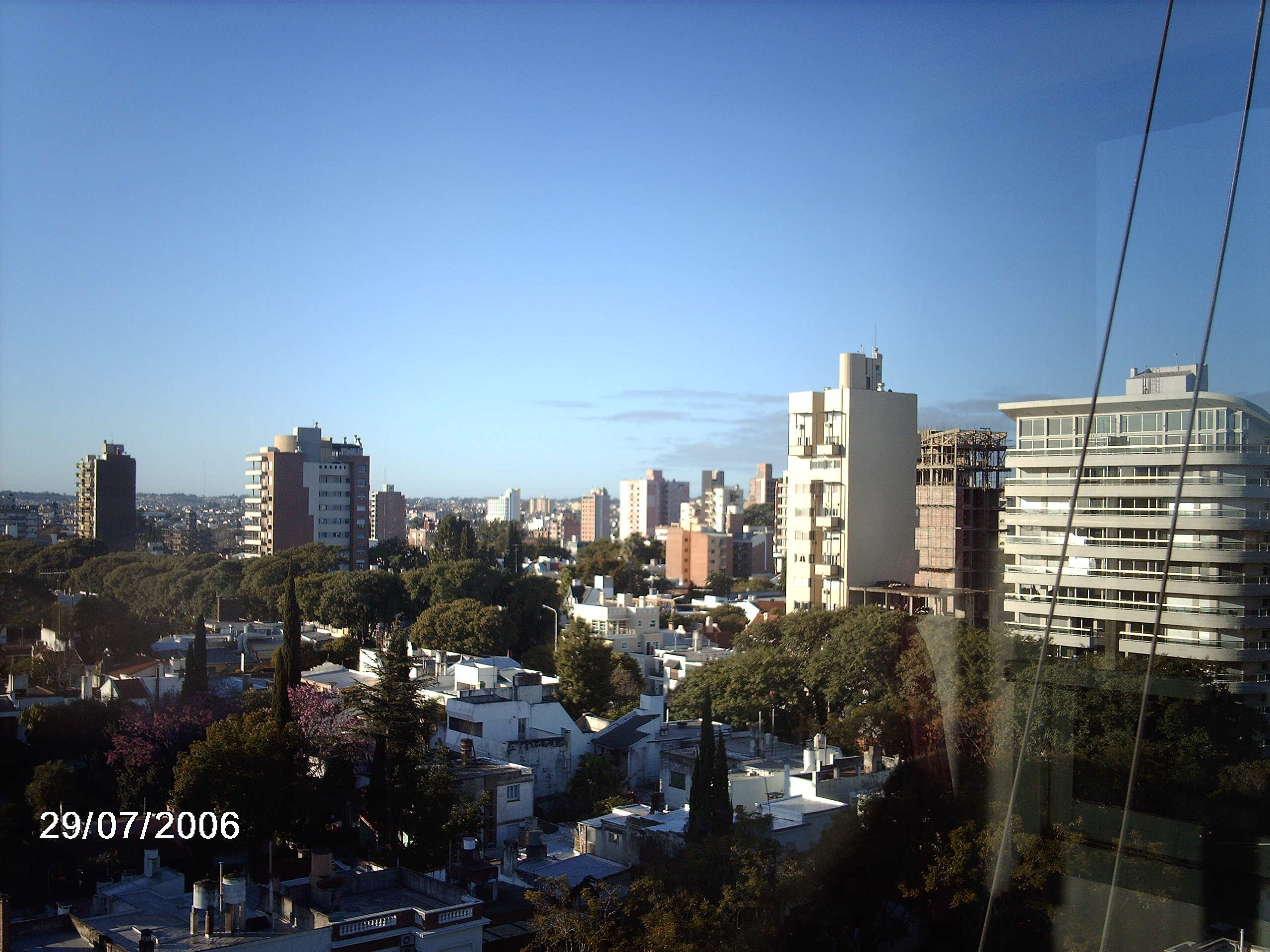 Paraná, Provincia de Entre Ríos, Argentina.